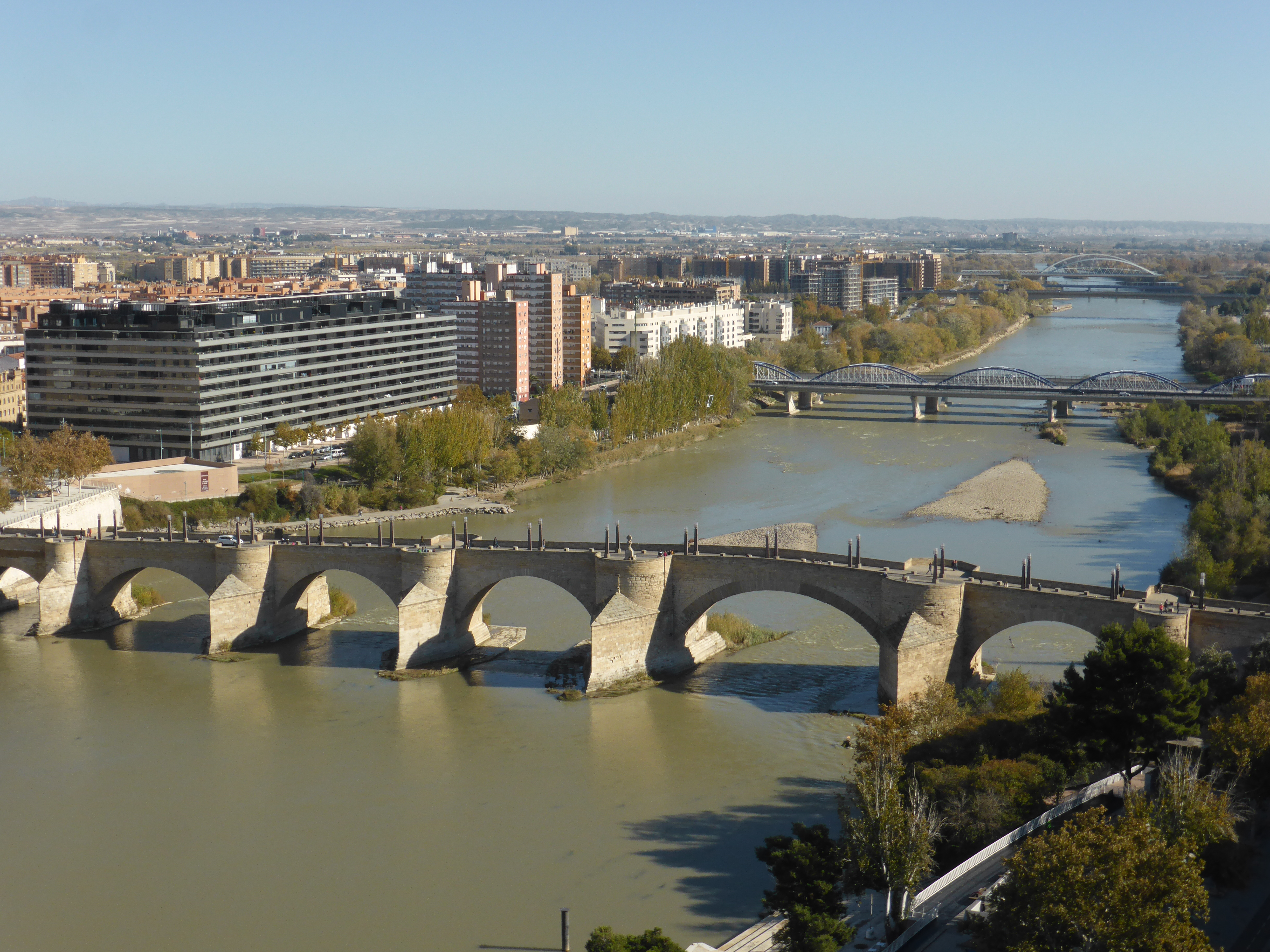 El Puente de Piedra desde la torre con ascensor de la basílica del Pilar, de Zaragoza.